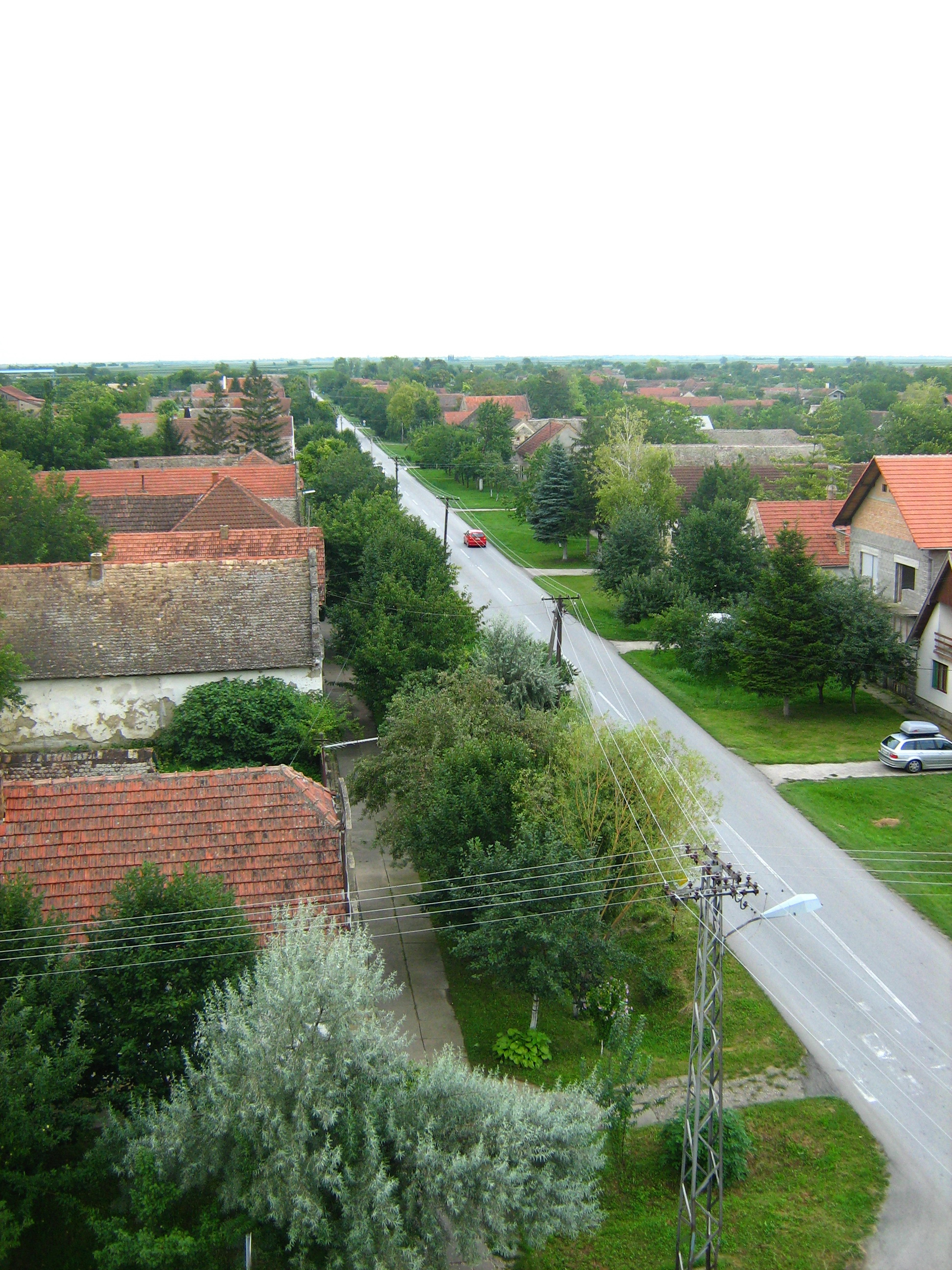 photo taken from slovak evangelistic church